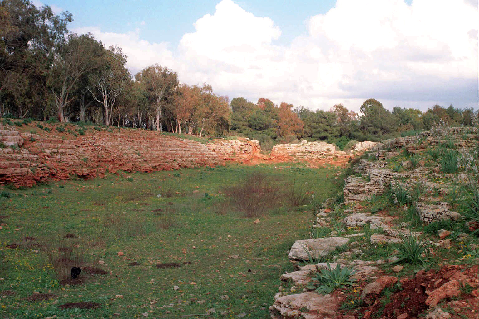 Loris - viaggio Siria - febbraio 2005